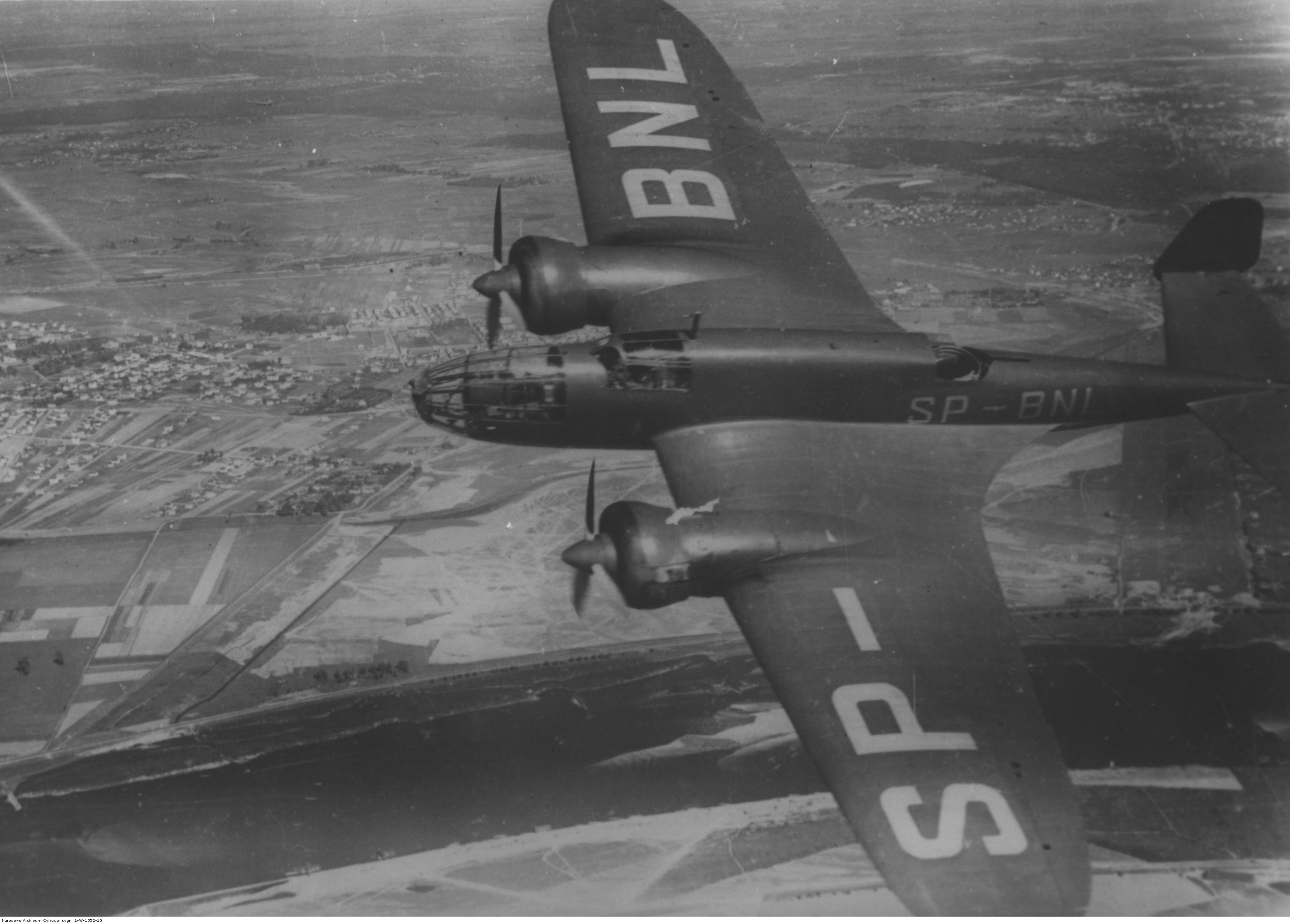 Samolot PZL-37A bis Łoś z cywilnymi znakami rozpoznawczymi SP-BNL podczas lotu nad Warszawą. Widoczna Wisła i zabudowa Gocławia.